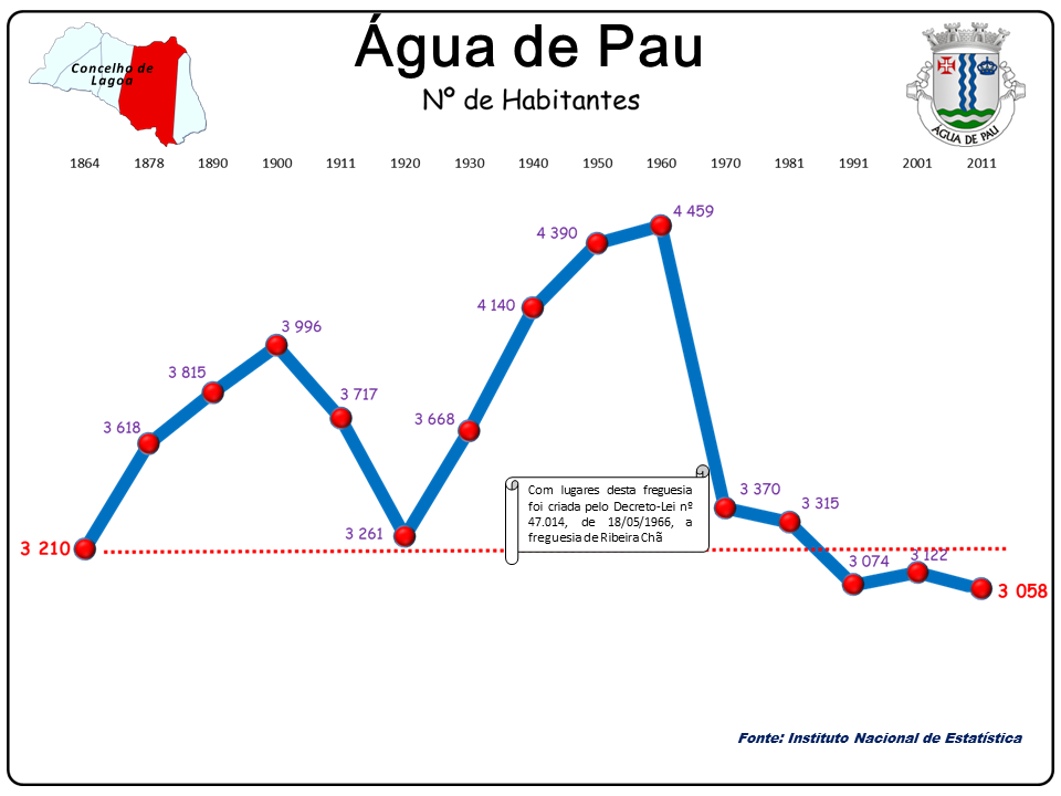 População